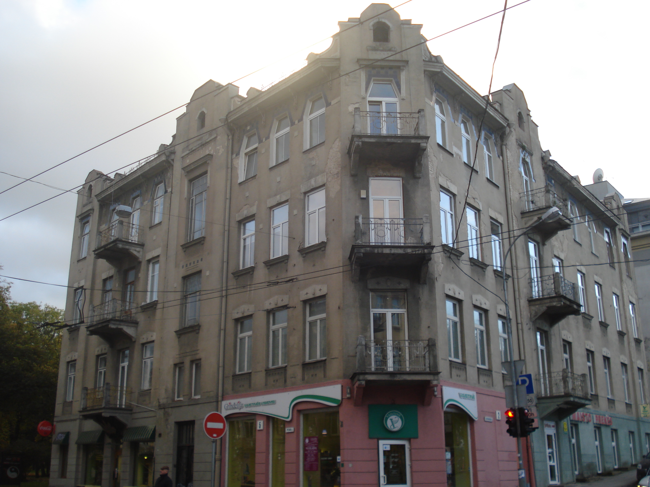 Kazimierz Rutski's house in Vilnius by Wacław Michniewicz (1910). Pylimo g. 5